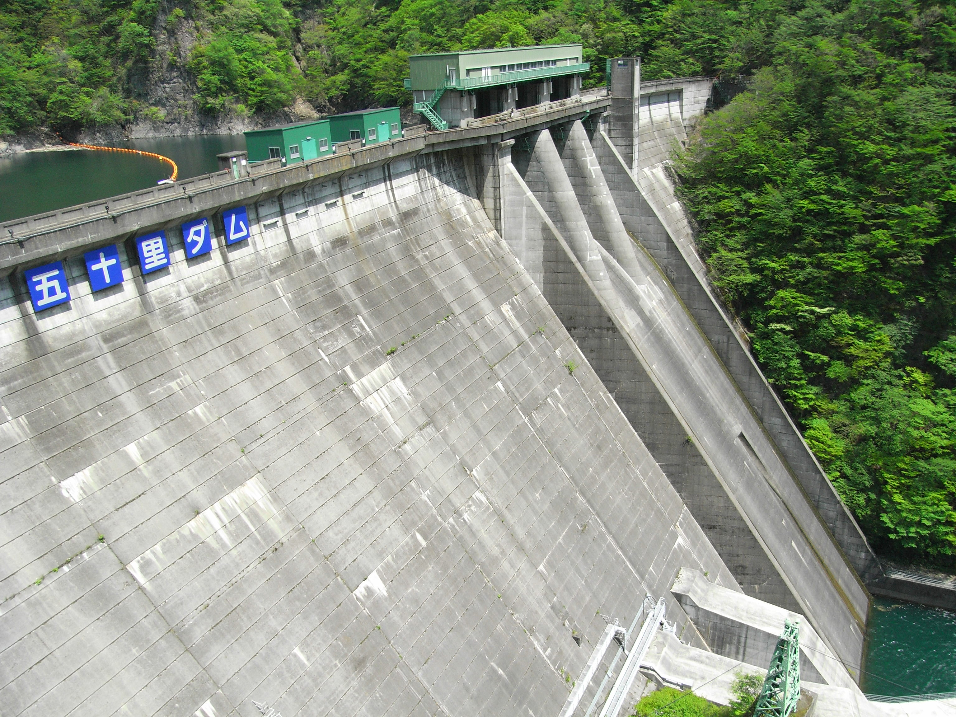 Dam